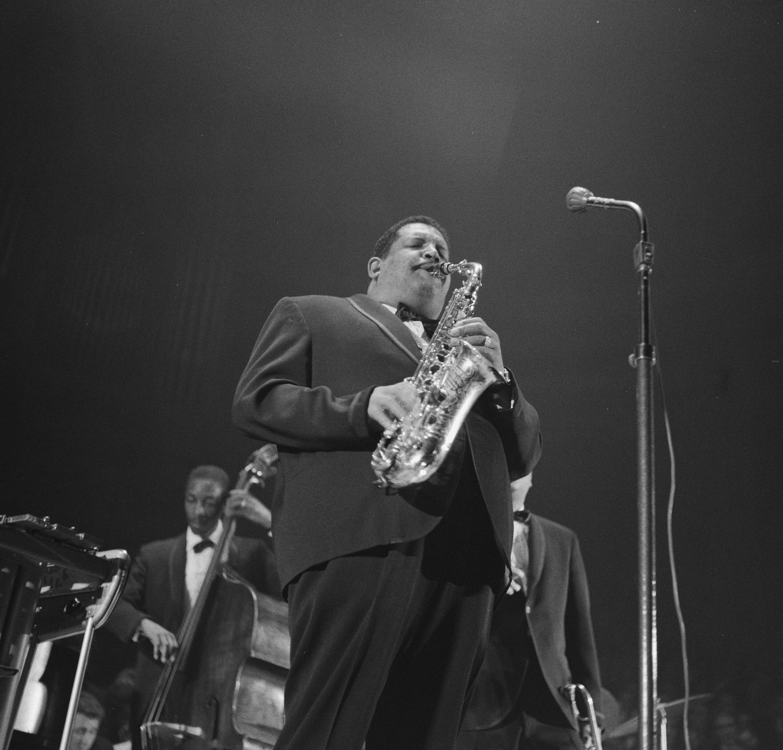 Collectie / Archief : Fotocollectie Anefo Reportage / Serie : [ onbekend ] Beschrijving : Cannonhall Adderley geeft Nachtconcert in het Concertgebouw Datum : 8 april 1961 Locatie : Amsterdam, Noord-Holland Trefwoorden : concerten, jazz, muziek Persoonsnaam : Cannonball Adderley Julian Instellingsnaam : Concertgebouw Fotograaf : Brinkman, Dave / Anefo Auteursrechthebbende : Nationaal Archief Materiaalsoort : Negatief (zwart/wit) Nummer archiefinventaris : bekijk toegang 2.24.01.03 Bestanddeelnummer : 912-3218 Reacties Geplaatst door Jazz liefhebber op 16 mei 2017 - 20:54. Alt-saxofonist Julian 'Cannonball' Adderley en cornettist Nat Adderley en bassist Sam Jones.